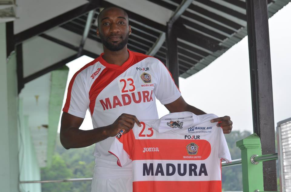 Image en Club